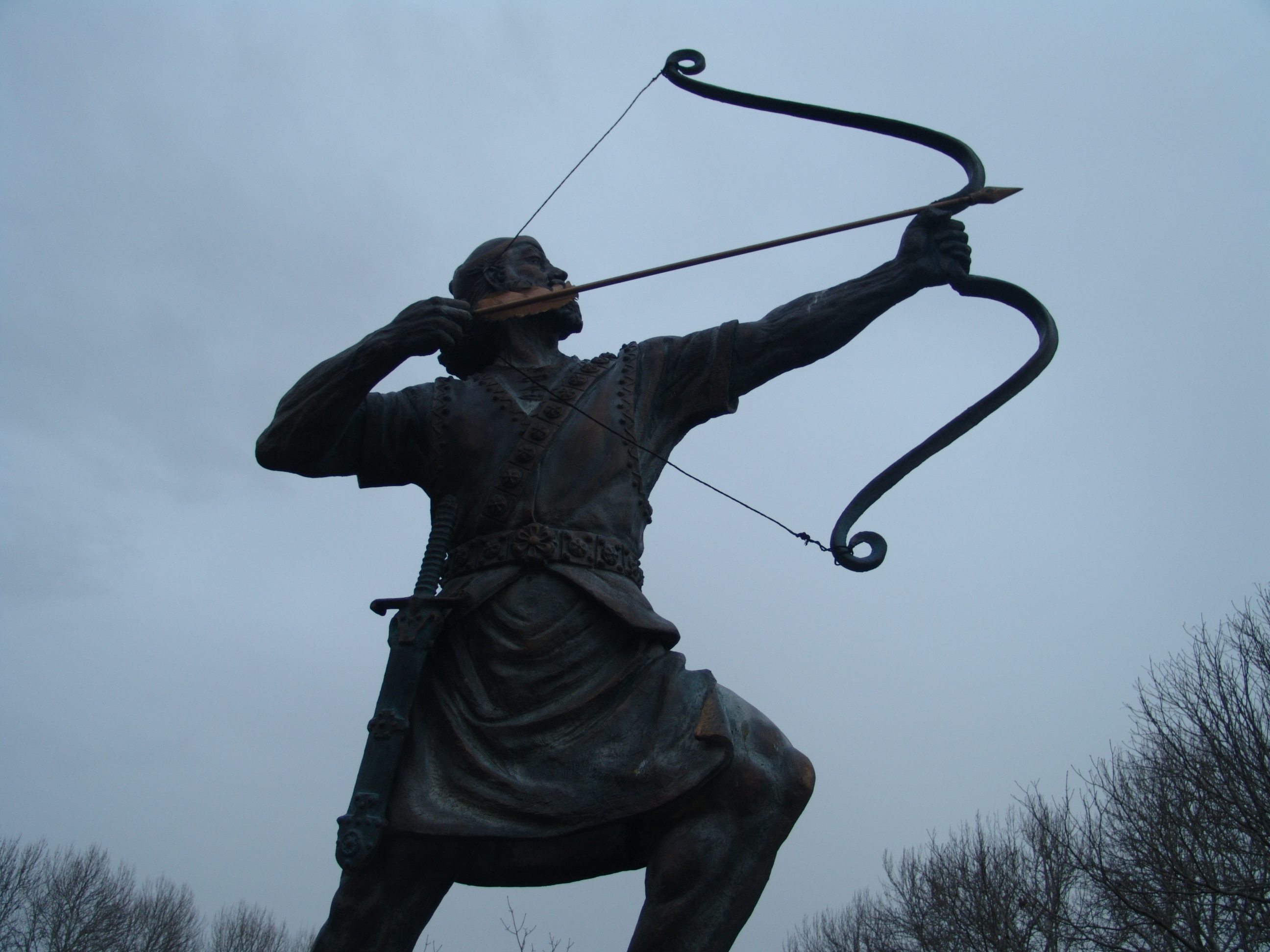 تندیس آرش کمانگیر در مجموعه سعدآباد تهران